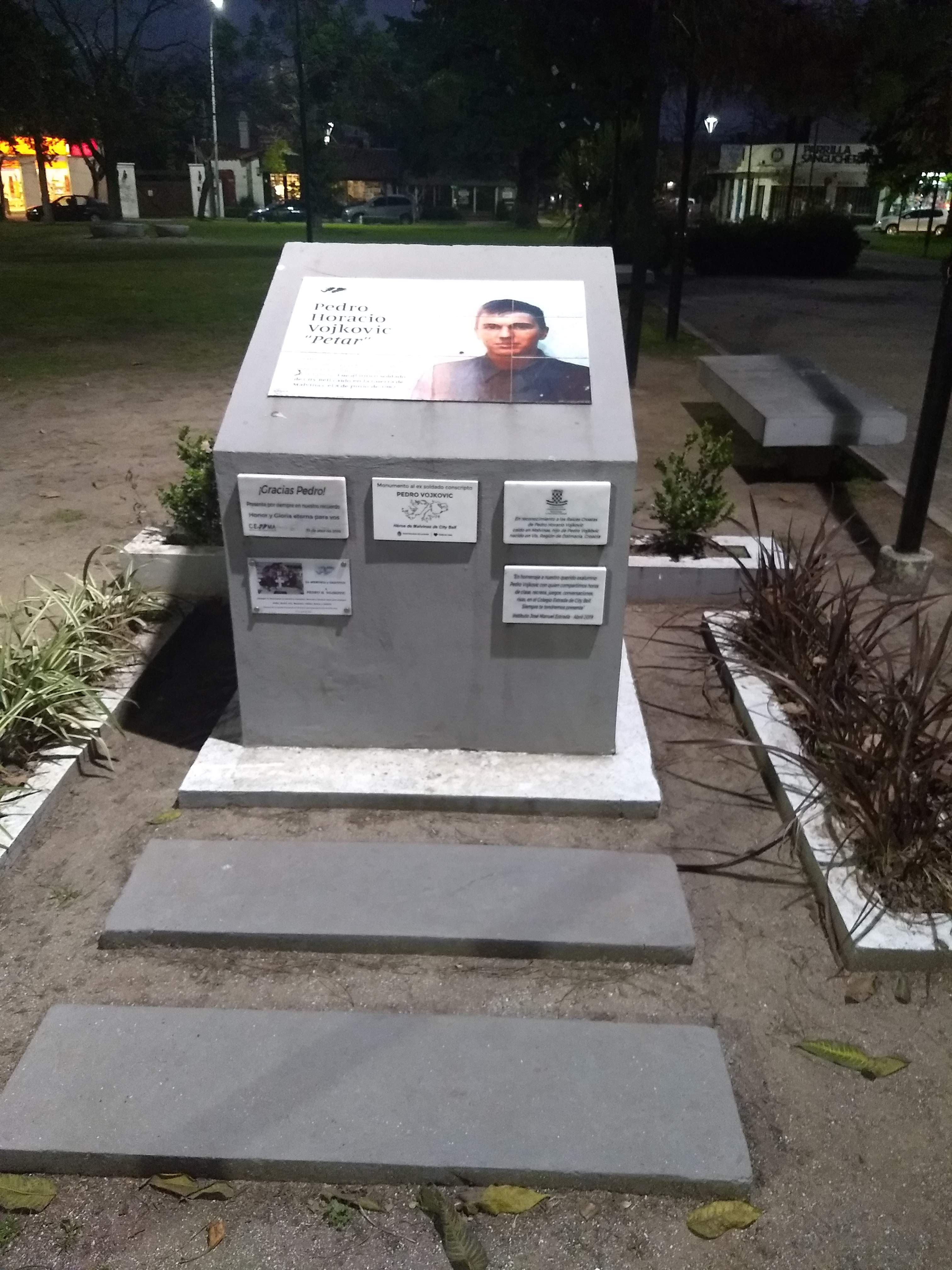 Vojkovic fue obligado a formar parte de la Armada Argentina durante el conflicto bélico contra Inglaterra por la soberanía de las las Islas Malvinas, en 1982. Falleció en el campo intentando procurarse alimento. Su cuerpo permeneció como NN en las islas hasta 2017 que fue indentificado junto a otros soldados que corriron la misma suerte. En 2019 la comunidad del pueblo donde nació levantó un monolito en su honor.